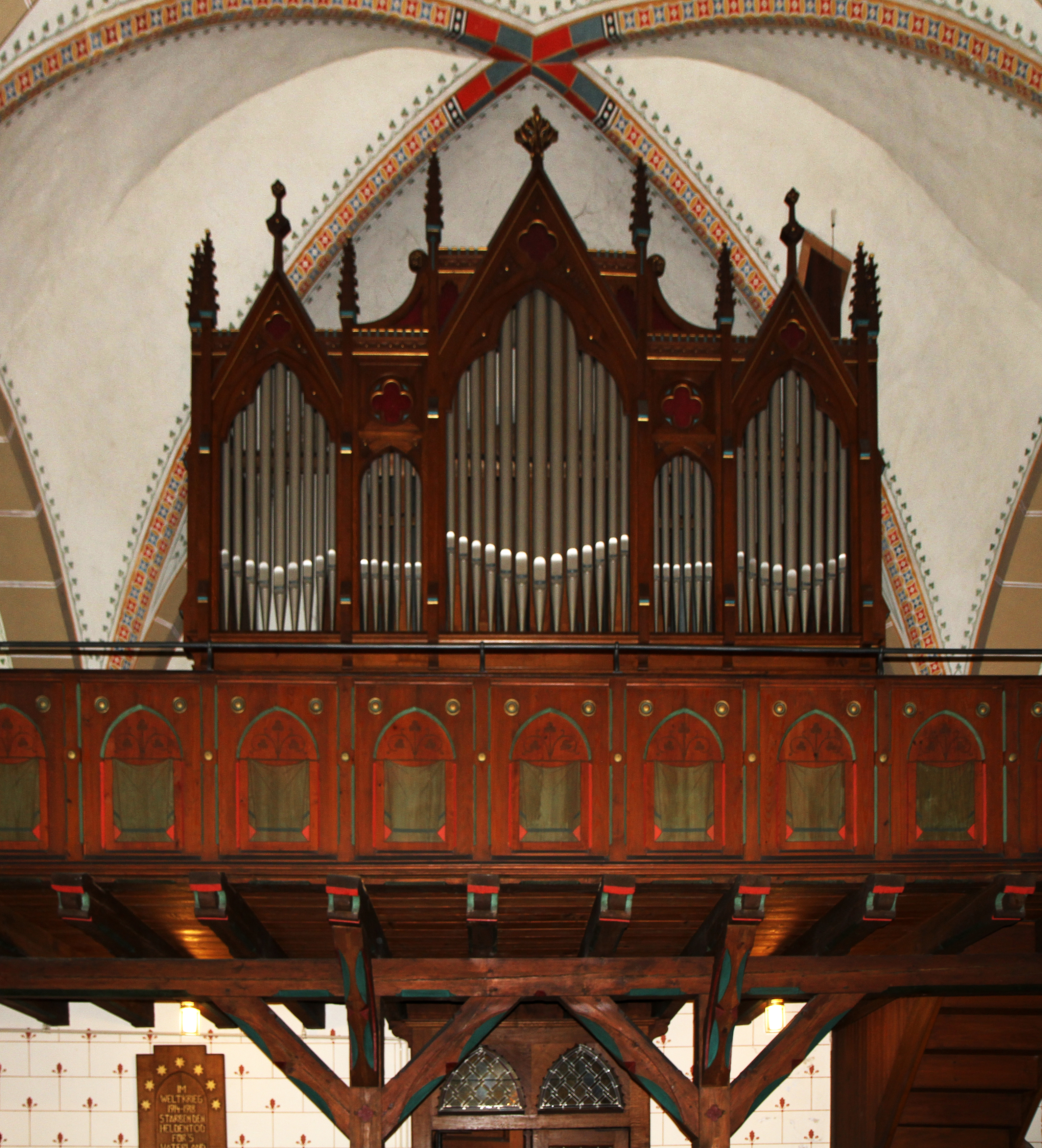 Evangelische Kirche Oberwesel, Chablis-Straße. Die Kirche ist ein neugotischer Backsteinbau, der nach Plänen des Architekten August Heinz aus Boppard zwischen 1897 und 1899 erbaut wurde.